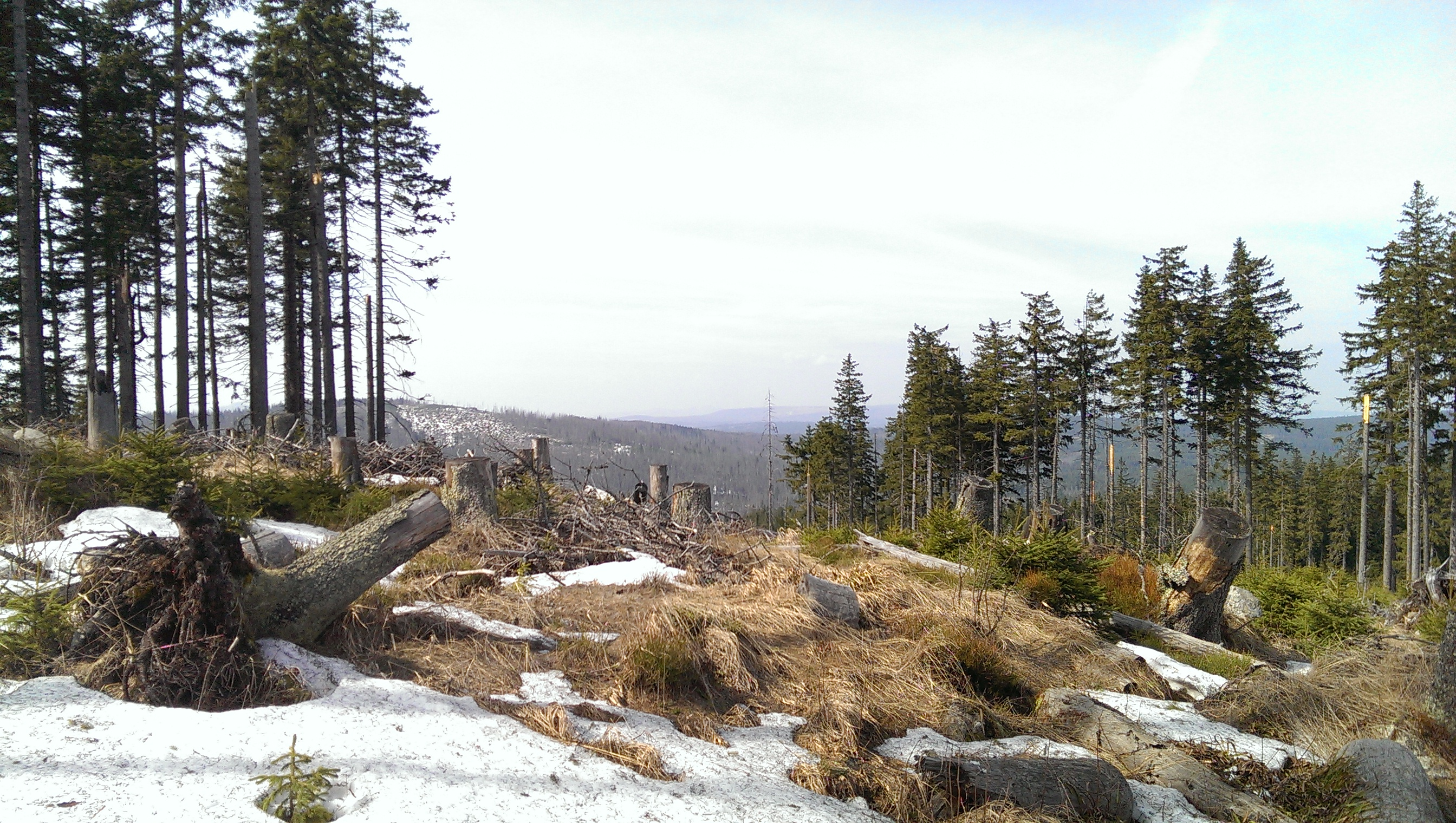 Stráž